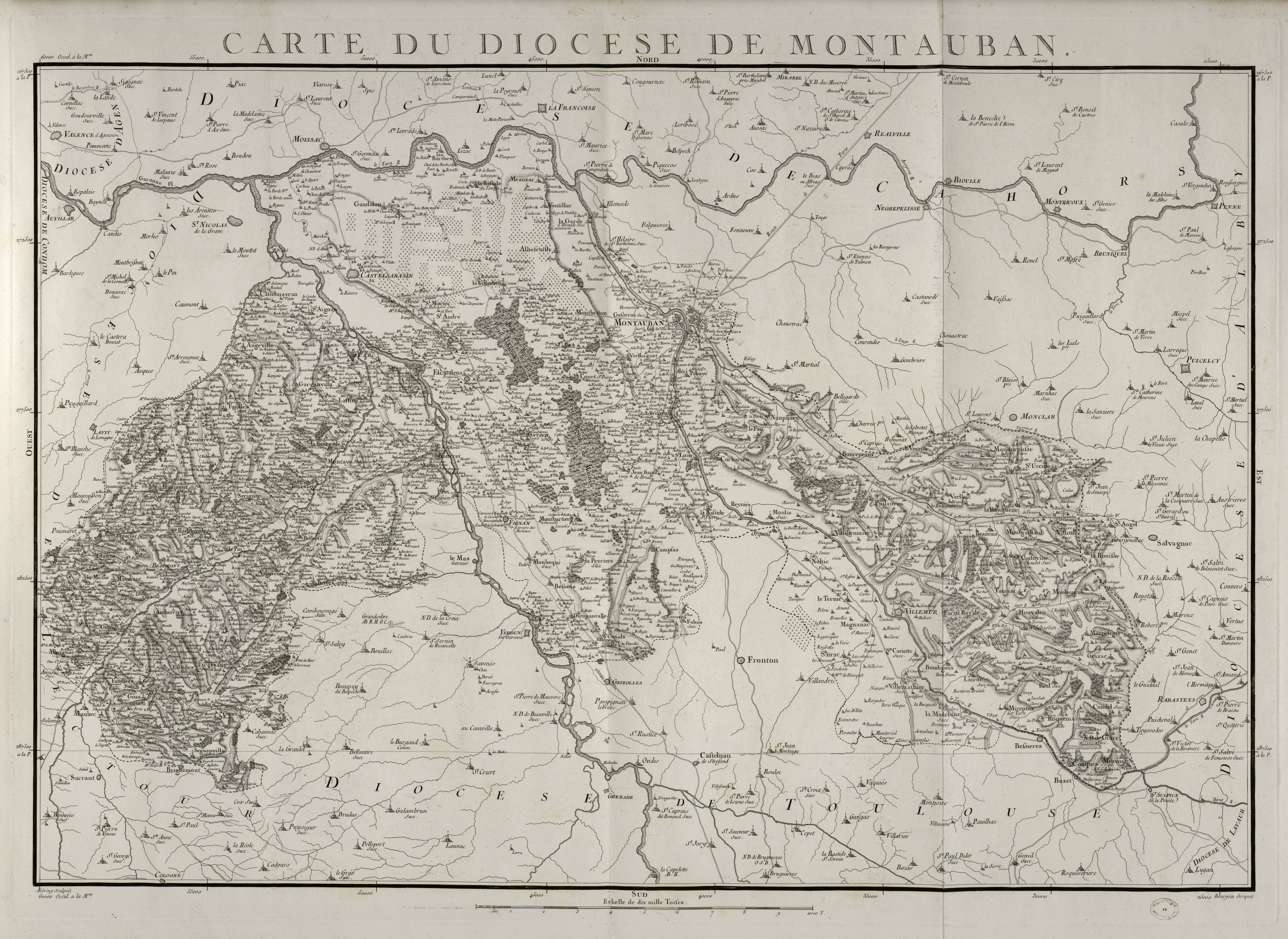 Carte du diocèse de Montauban, extraite de Diocèses de la province du Languedoc (1781)